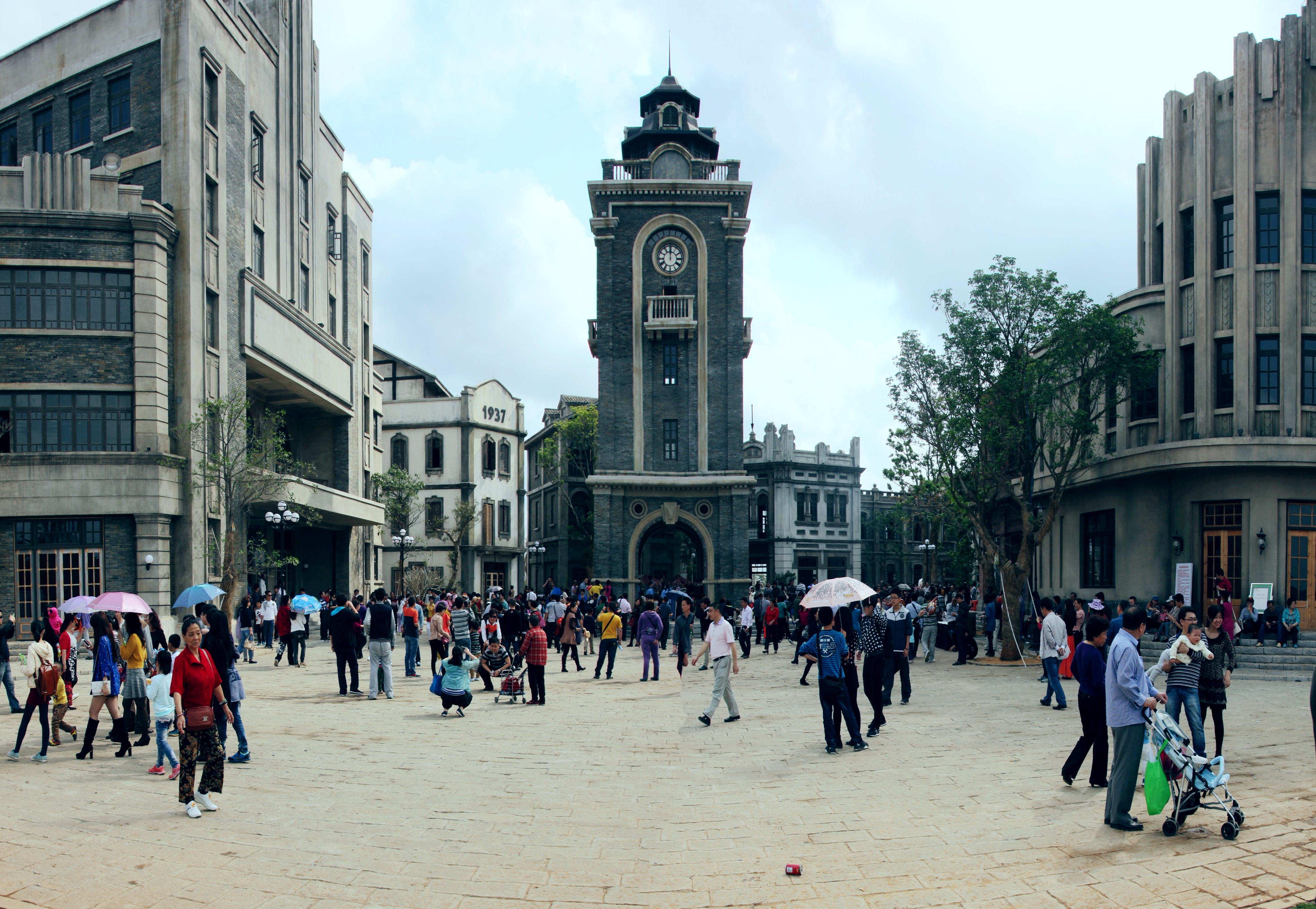 海南国际旅游岛——冯小刚电影公社景观（在建中）（宽幅）（东向）